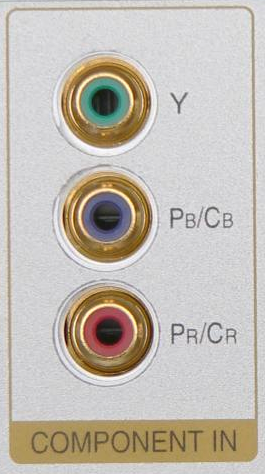 Component.Input